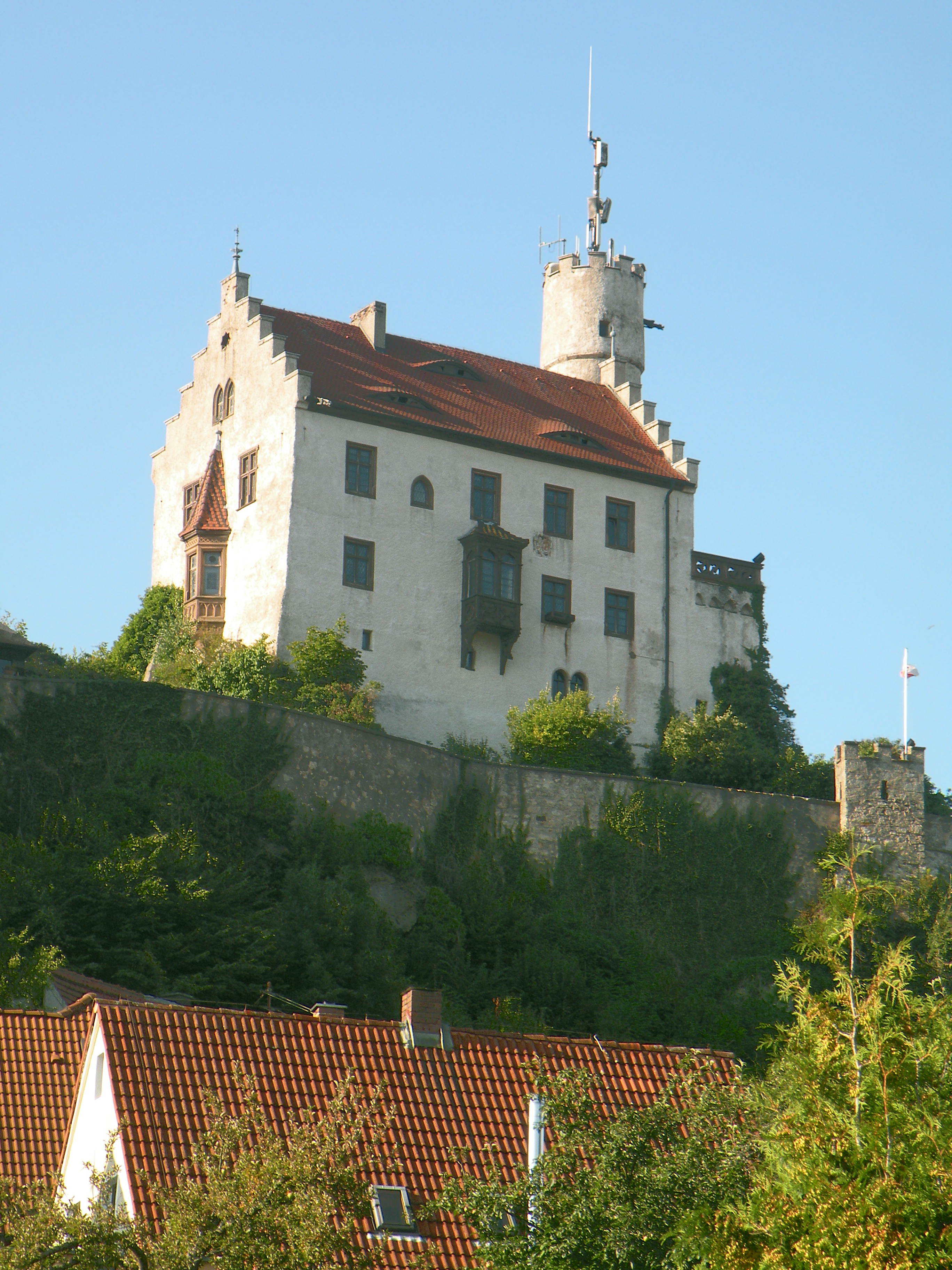 Castle_in_Goessweinstain.